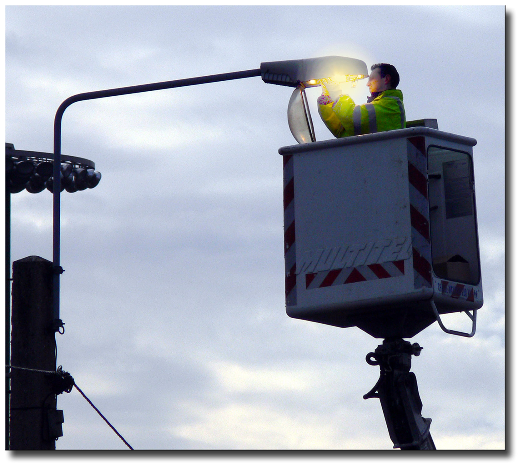 Le simple nettoyage d'un globe ou changement d'ampoule est une nécessité, mais il peut être fastidieux et coûteux en raison de la présence de fils électriques, obstacles, véhicules mal garés, etc. Dans les rues fréquentées ou étroites, deux voire trois ou quatre personnes sont nécessaires pour assurer la sécurité et ne pas trop perturber la circulation. À proximité des zones polluées, sous les arbres ou à proximité de l'eau, les luminaires se salissent plus vite. Les fabricants cherchent à produire des formes et des matériaux plus "autonettoyants", mais il est parfois difficile d'anticiper leur vieillissement. Rem : Dans certaines villes allemandes, on profite de de ce type d'opération pour - à la demande des riverains - ajouter un cache (peinture noire) dans le luminaire de manière à limiter l'intrusion de lumière non désirée dans leur domicile. Photo prise par F.Lamiot en 2006, mise à disposition sous licence Creative Commons CC-BY-SA. urbanisme optique Pollution lumineuse Catégorie:phénomène optique